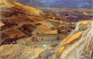 Srpskohrvatski / српскохрватски: Pogled sa Banstola prema Dunavu, Galerija Matice srpske u Novom Sadu